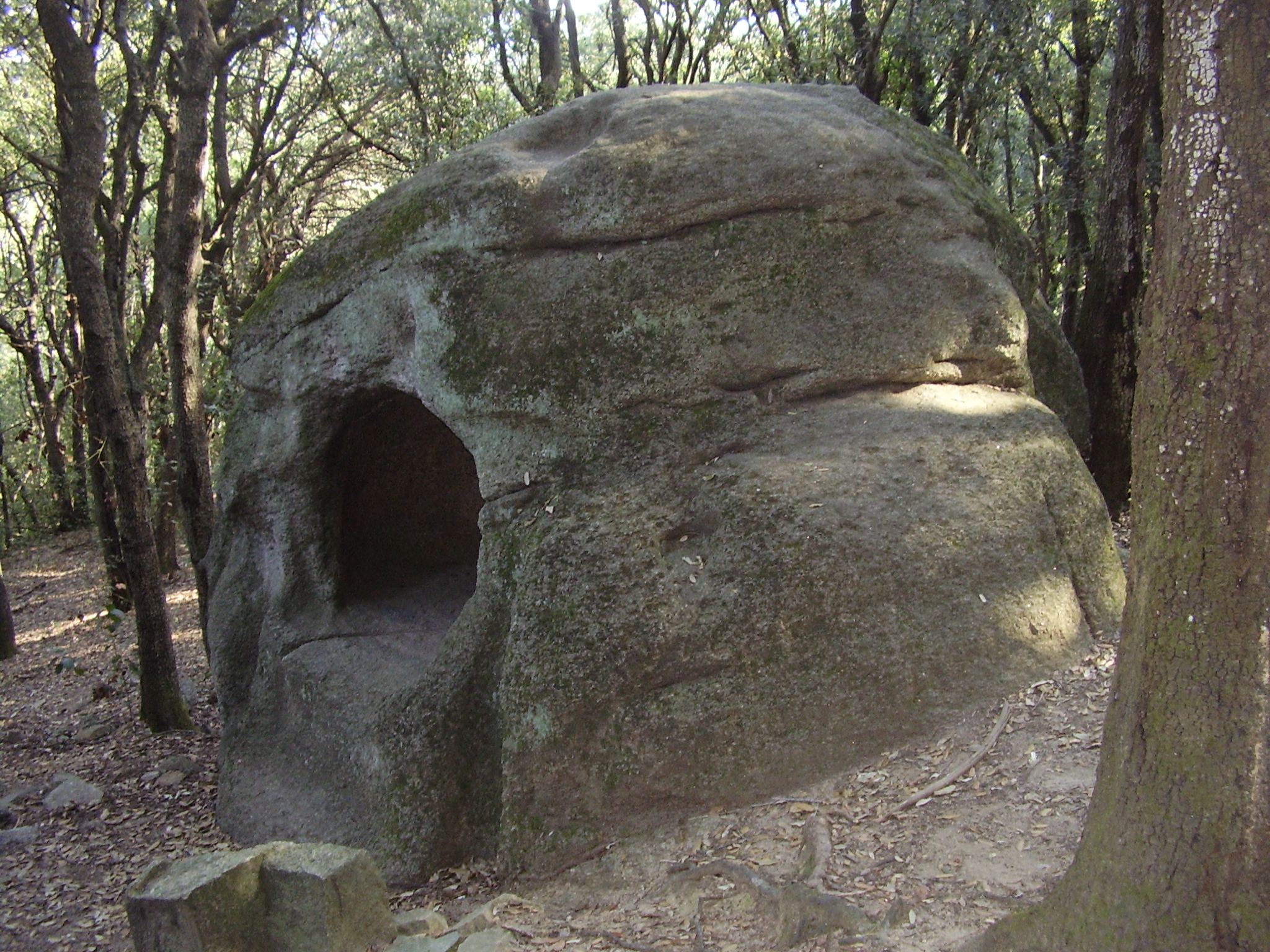 La Roca Foradada, Vallromanes, El Vallès Oriental, Catalunya